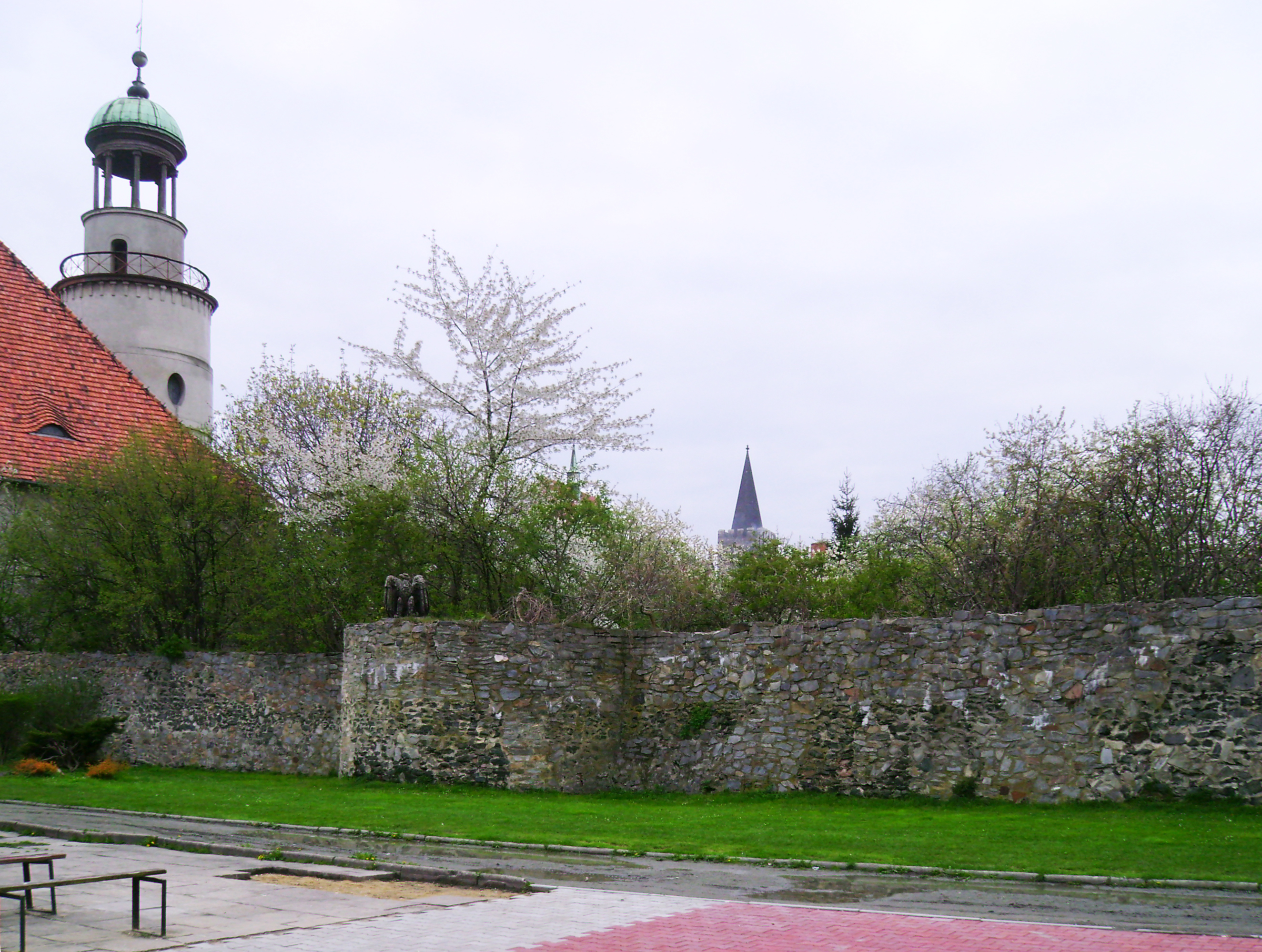 mury obronne Ziębice, Ziębice